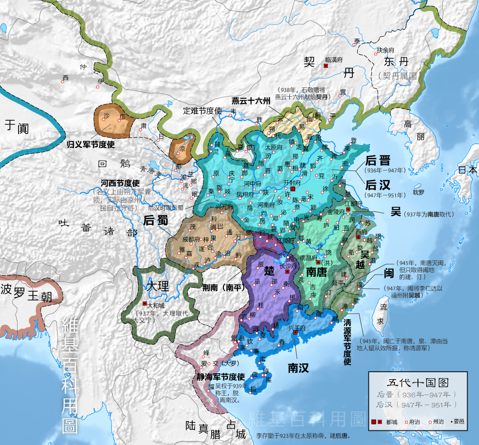 五代